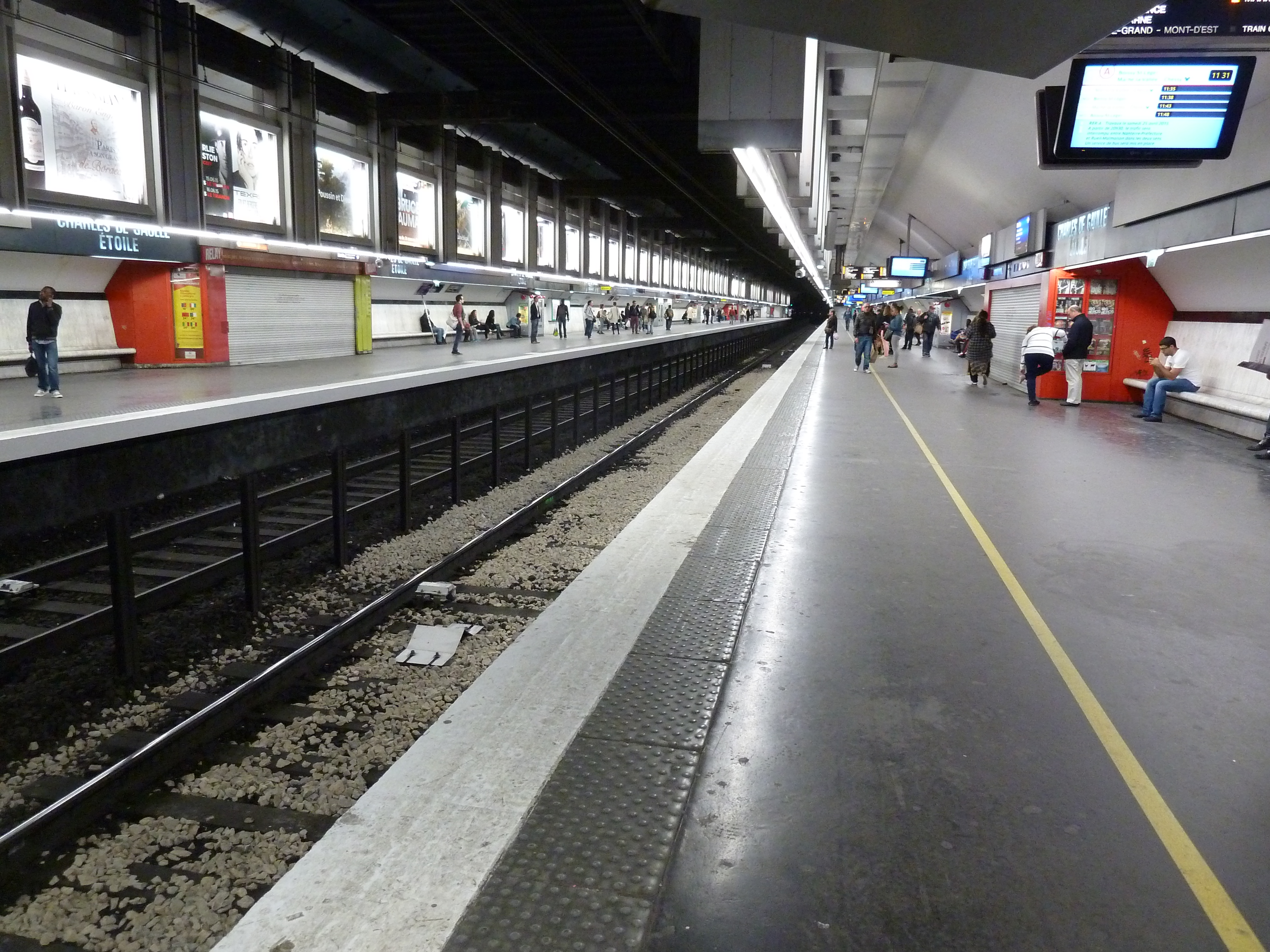 Station Etoile du RER A à Paris.